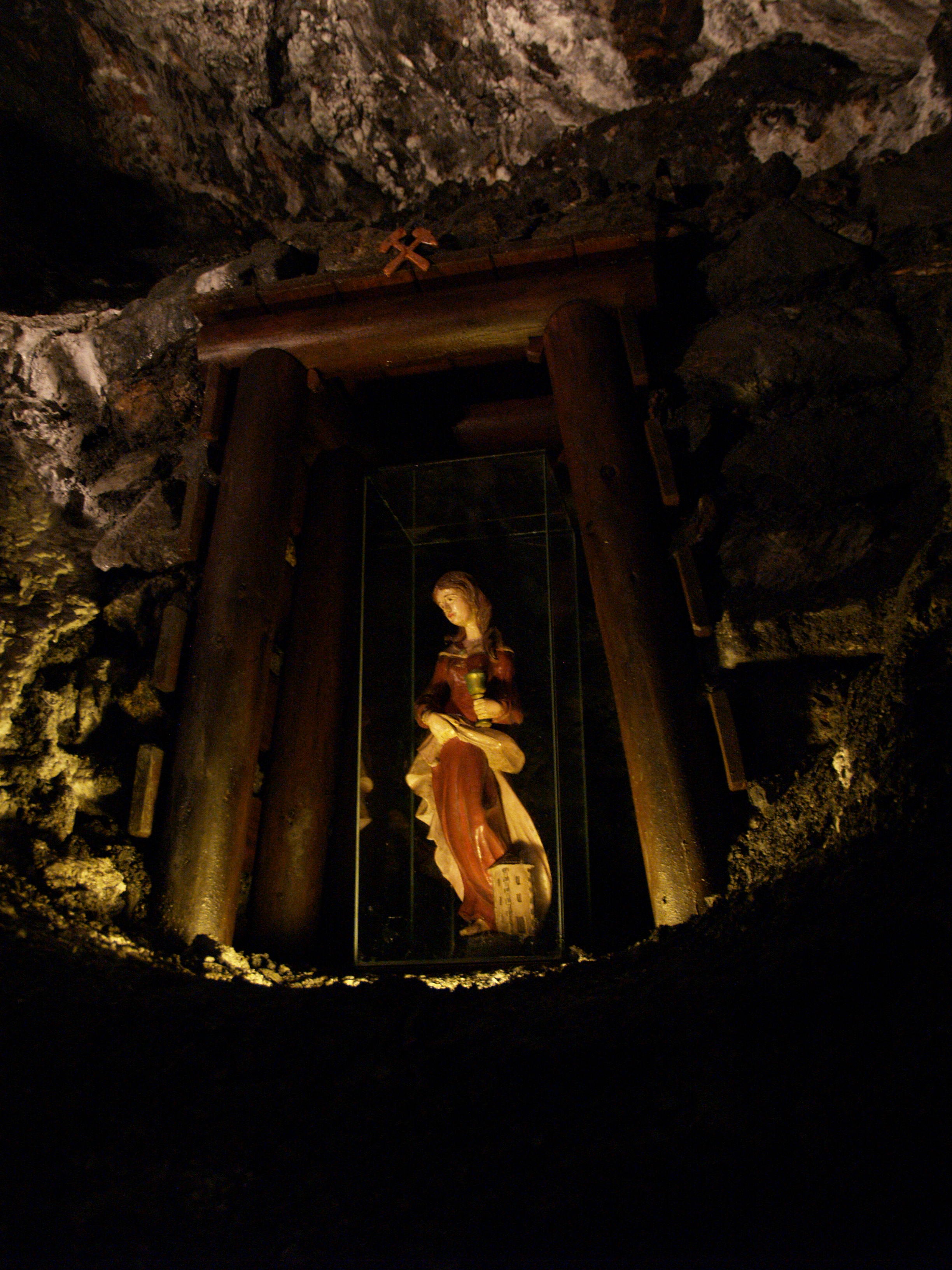 Statue der Heiligen Barbara im Kupferschaubergwerk Radmer